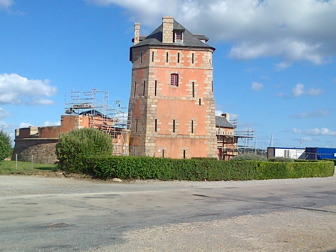 Tour Vauban, Camaret sur Mer